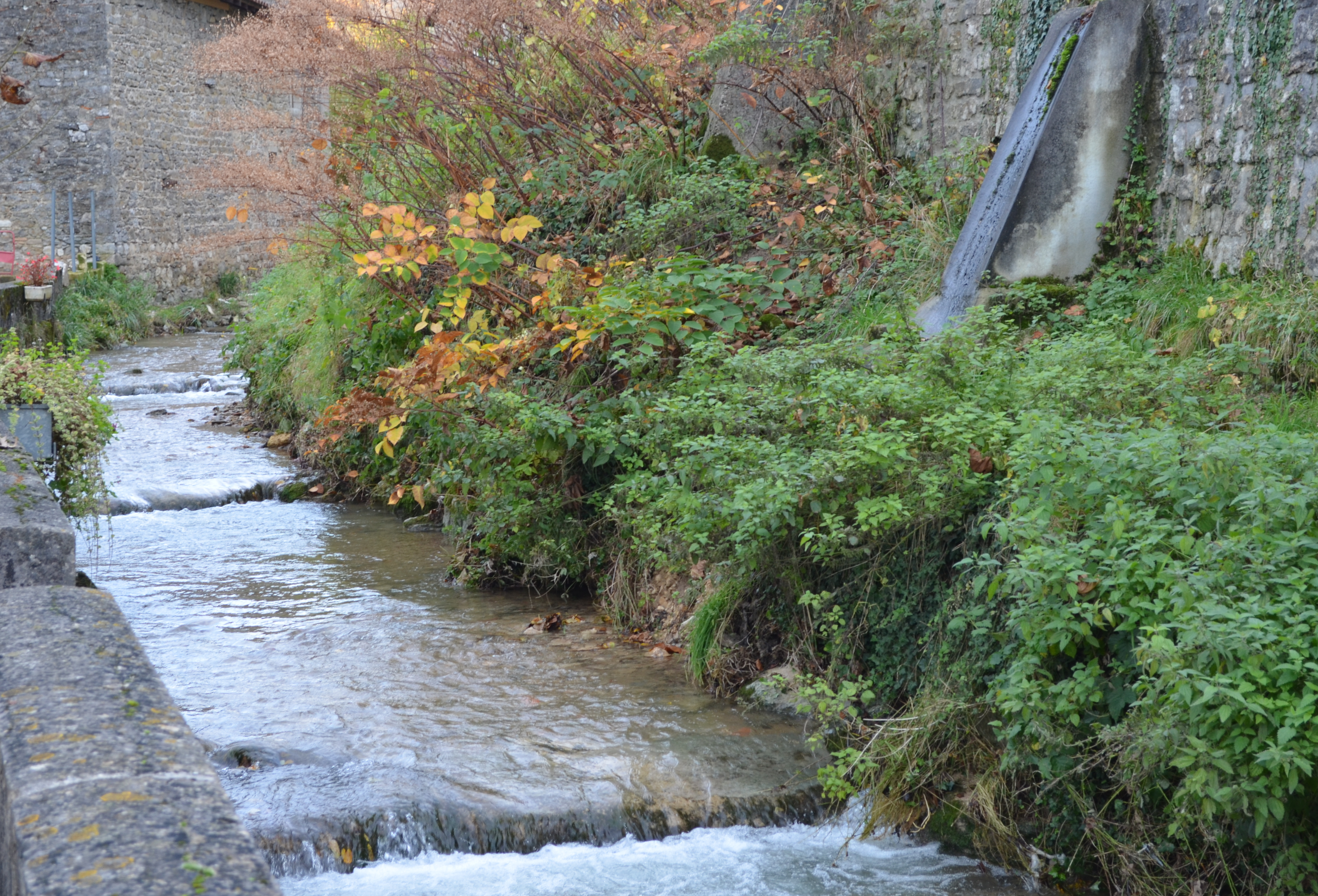 Photographie de Vaux-en-Bugey, Ain, France.